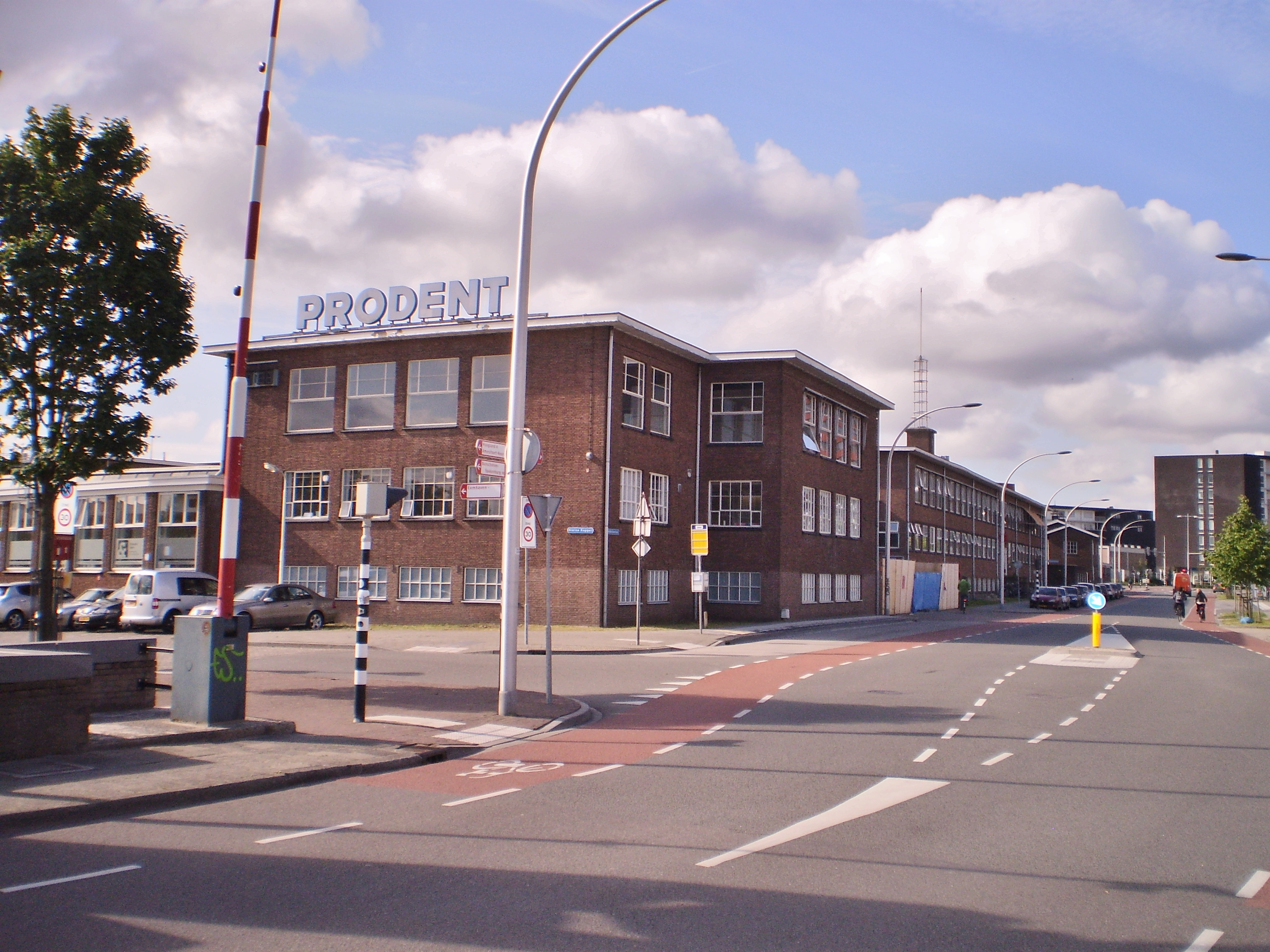 Voormalige Prodentfabriek